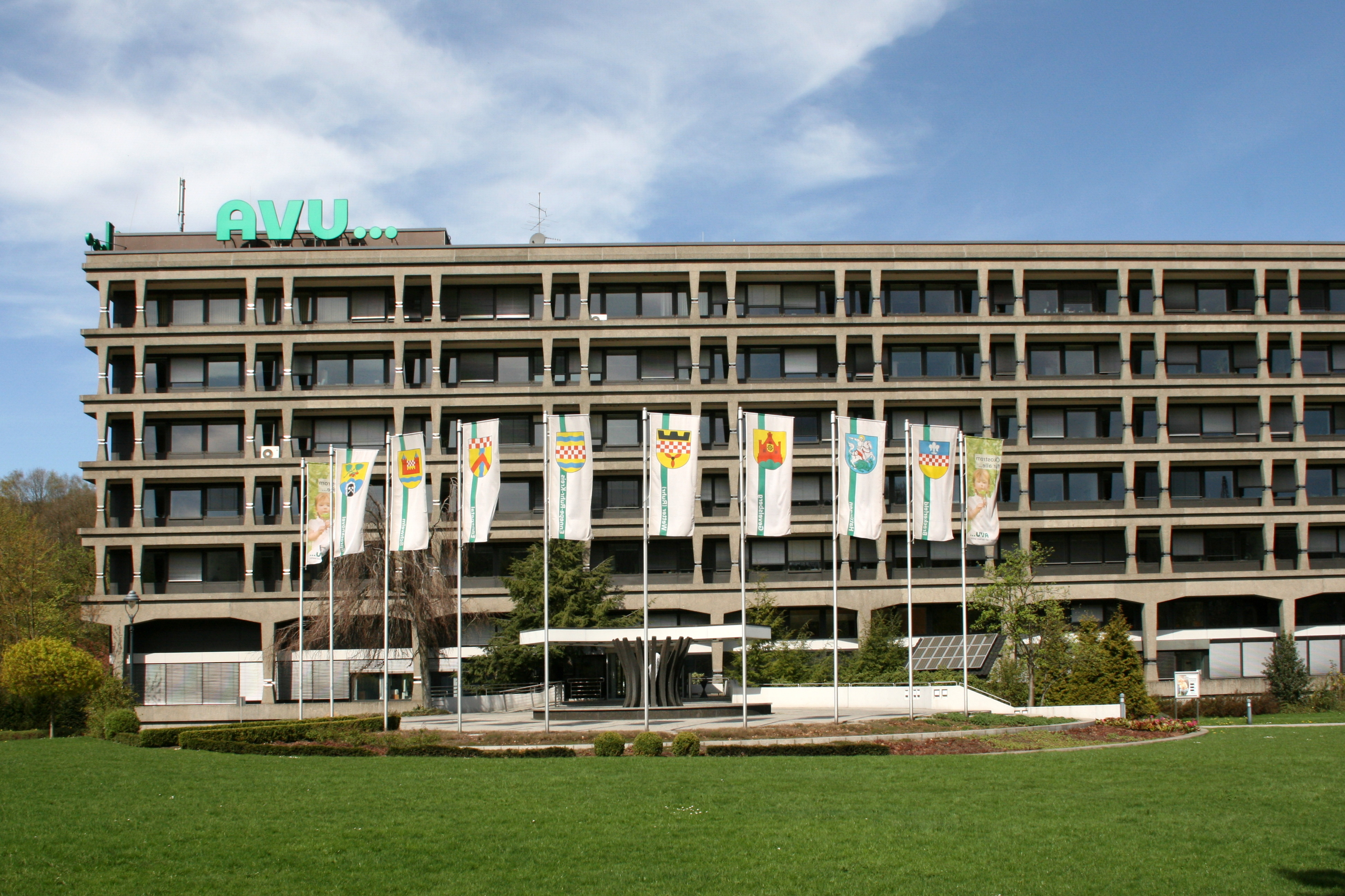 Aktiengesellschaft für Versorgungsunternehmen (AVU), An der Drehbank 18 in Gevelsberg